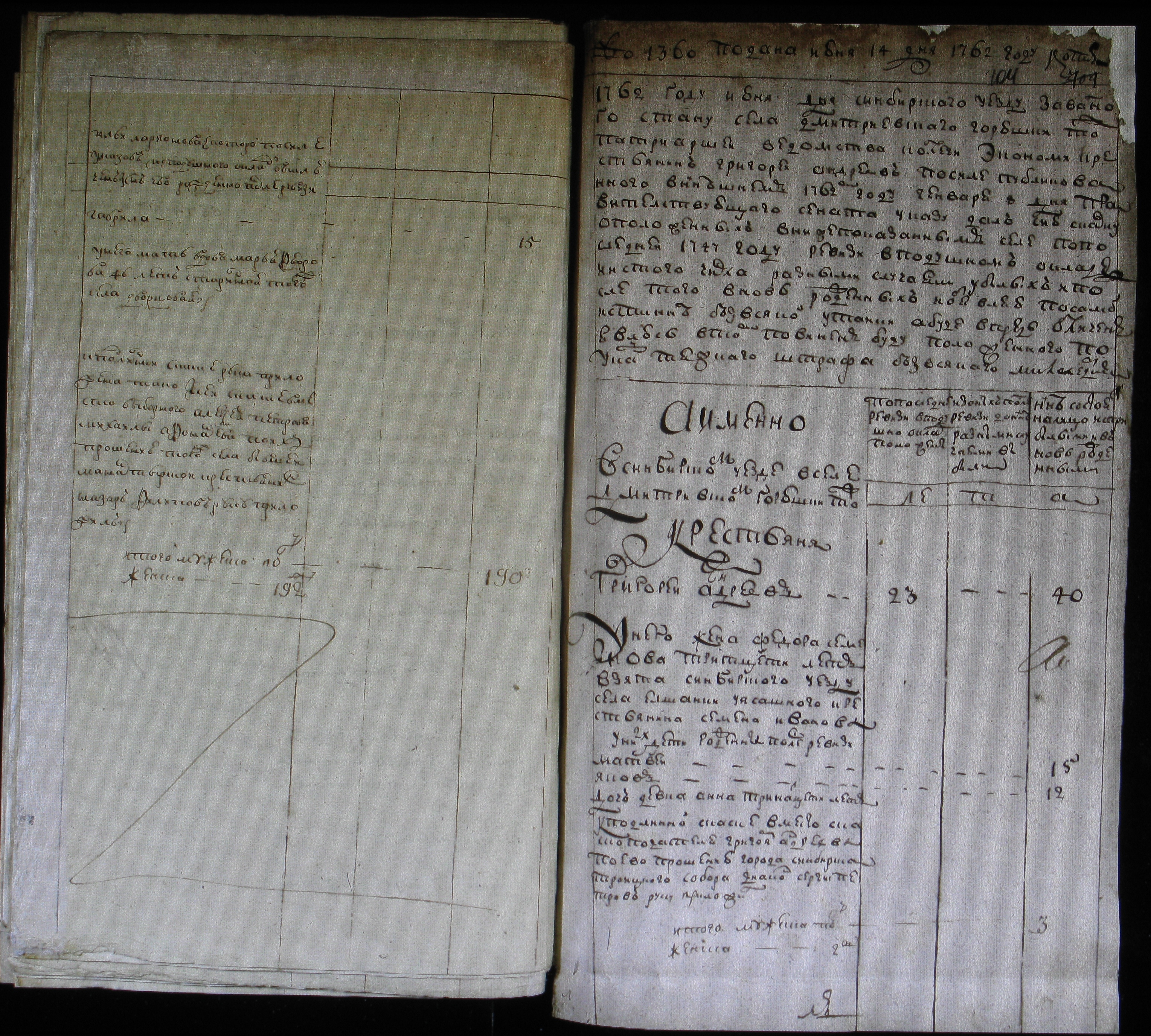 На данной фотографии можно отчетливо прочитать старое наименование села "Дмитриевское Горюшки" Симбриского уезда, Завального стана.